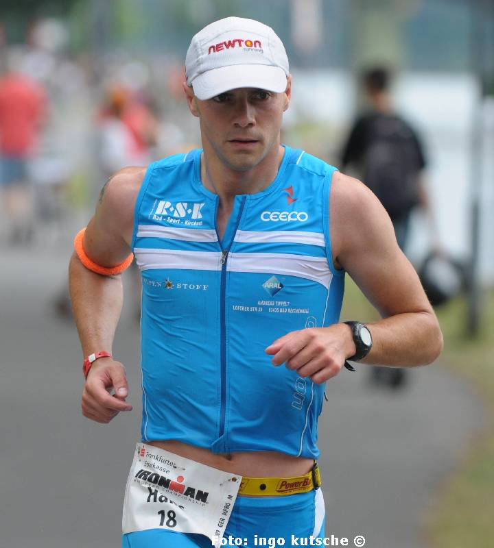 Hans Mühlbauer, Ironman Germany 2009, Frankfurt